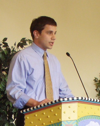 Brent Barton, Oregon politician